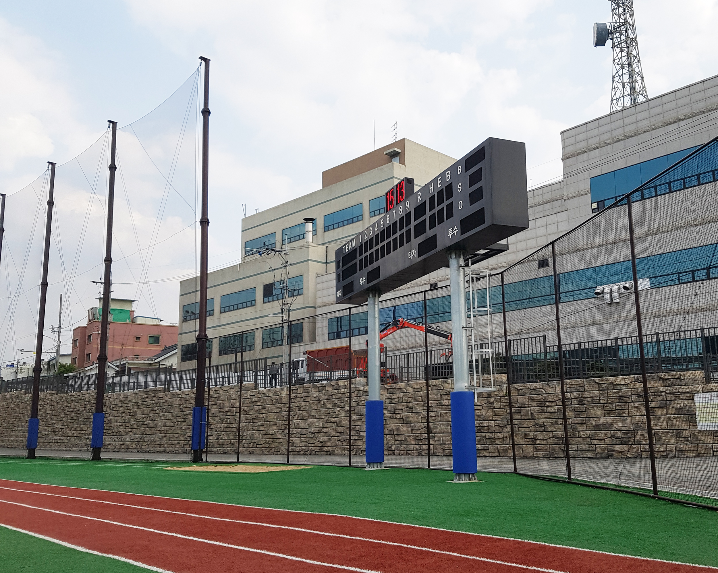 천안북중학교 야구 전광판